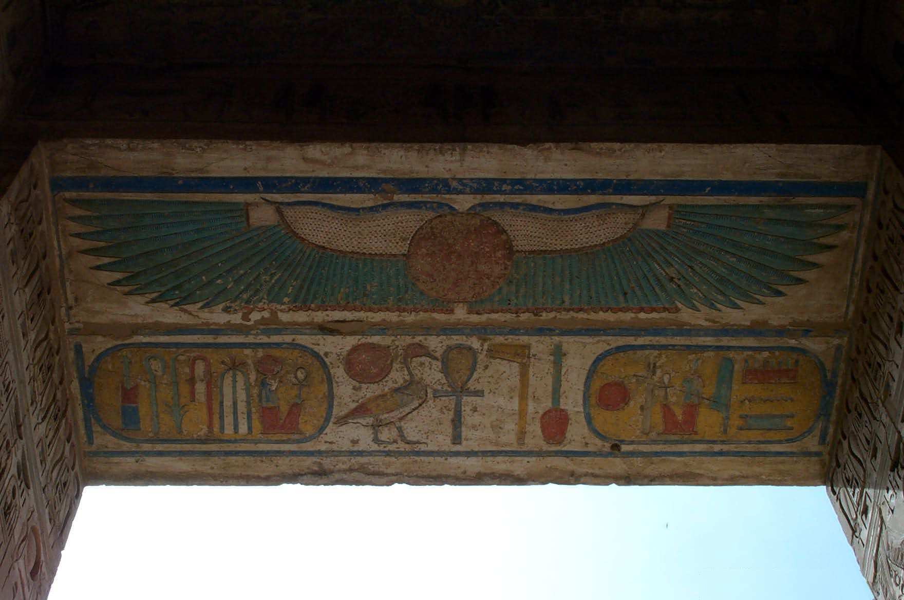 Szárnyas napkorong és Ramszesz kartusai (Medinet Habu)